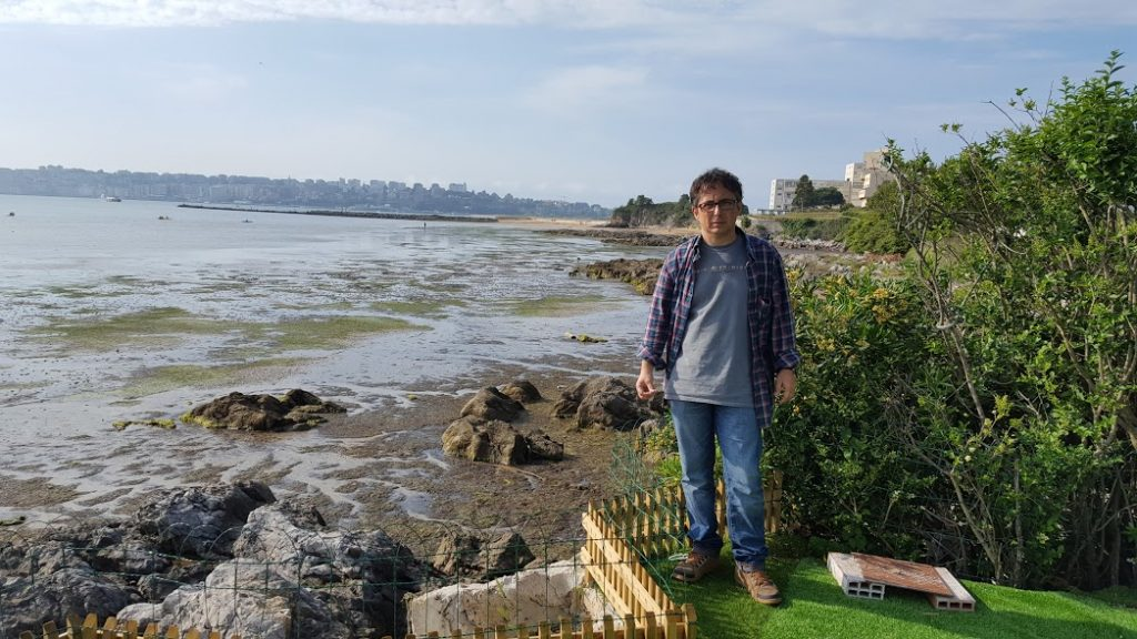 Iñaki Pinedo durante el rodaje de Ciaboga en Pedreña.